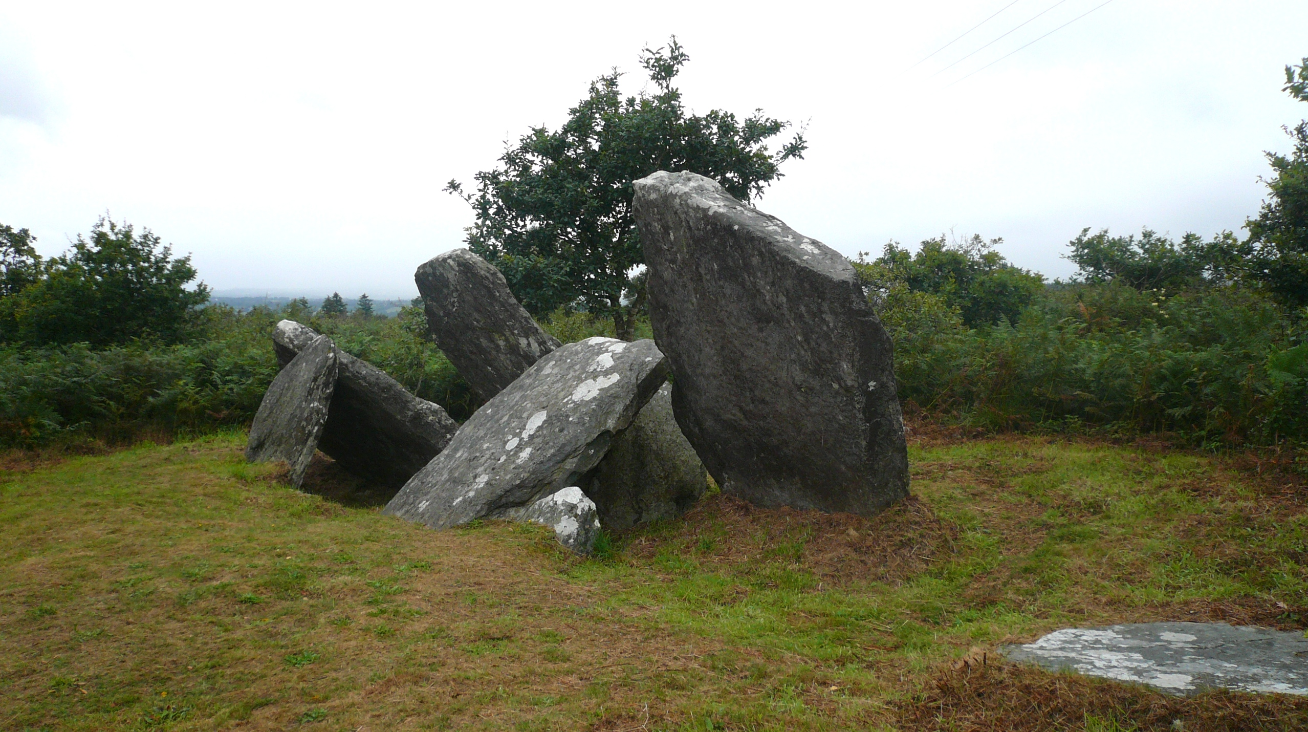 Allée couverte de Castel-Ruffel en Saint-Goazec, Finistère, Bretagne, France